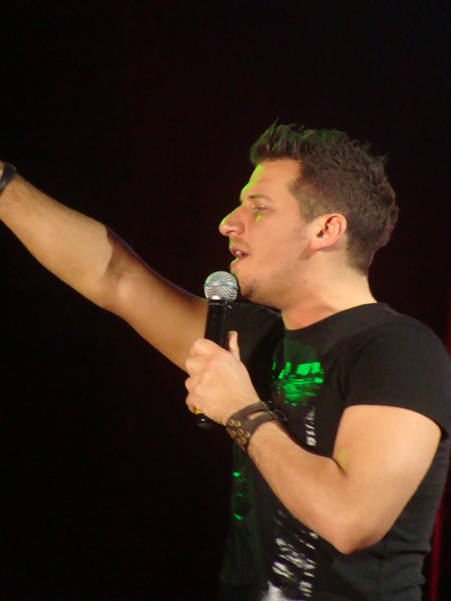 Vastag Csaba egy csíkszeredai koncerten 2011. április 13-án